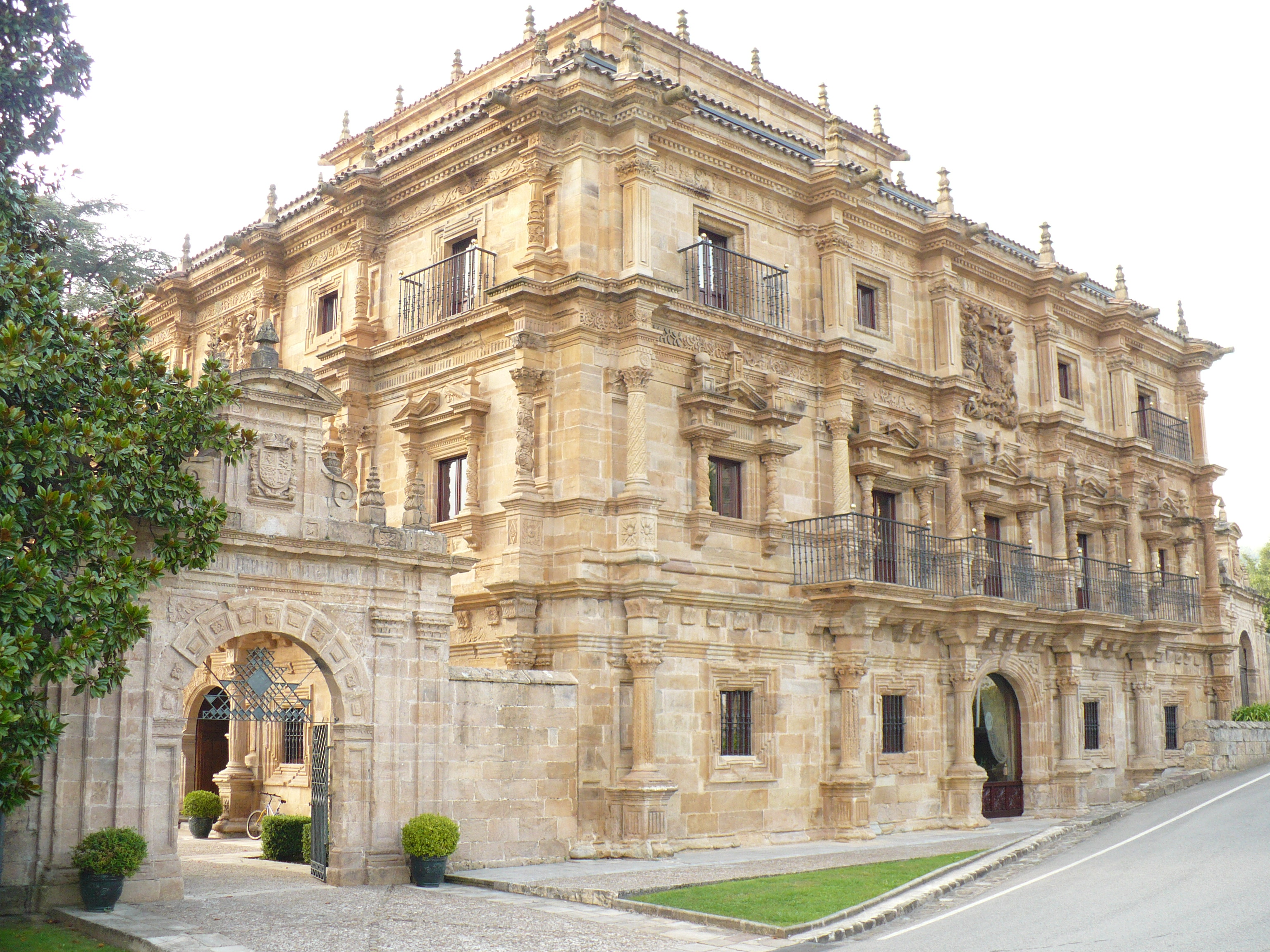 Palacio de Soñanes (Villacarriedo-Villacarrieu, Cantabria)